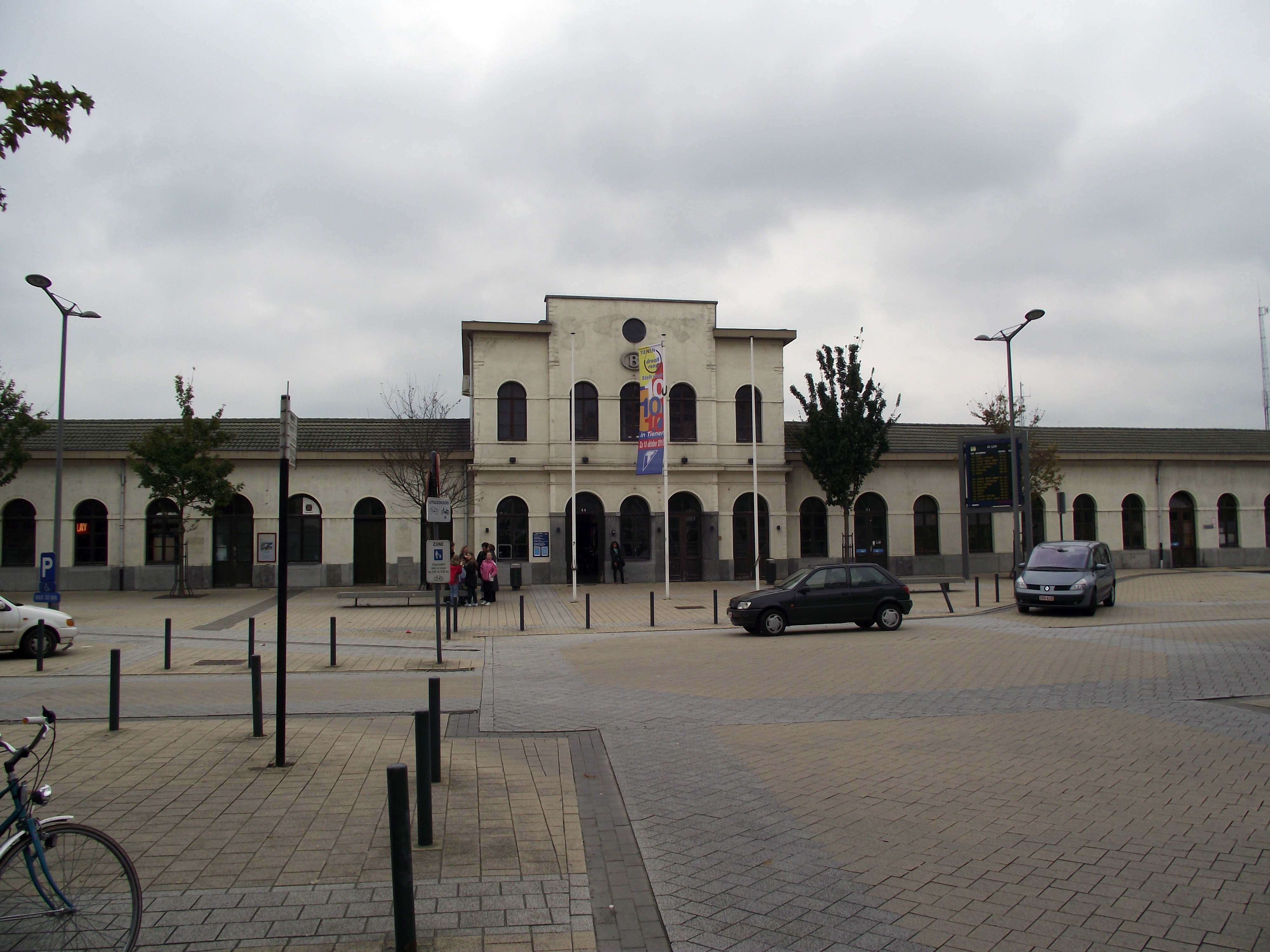 Station Tienen aan de voorkant.